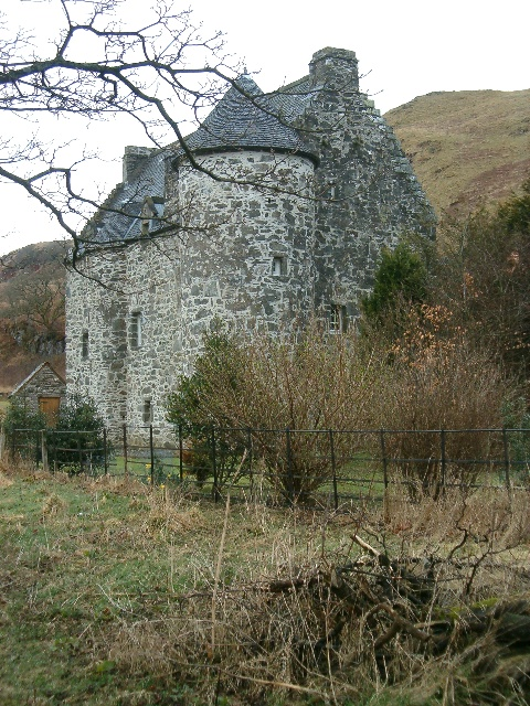 Kilmartin Castle